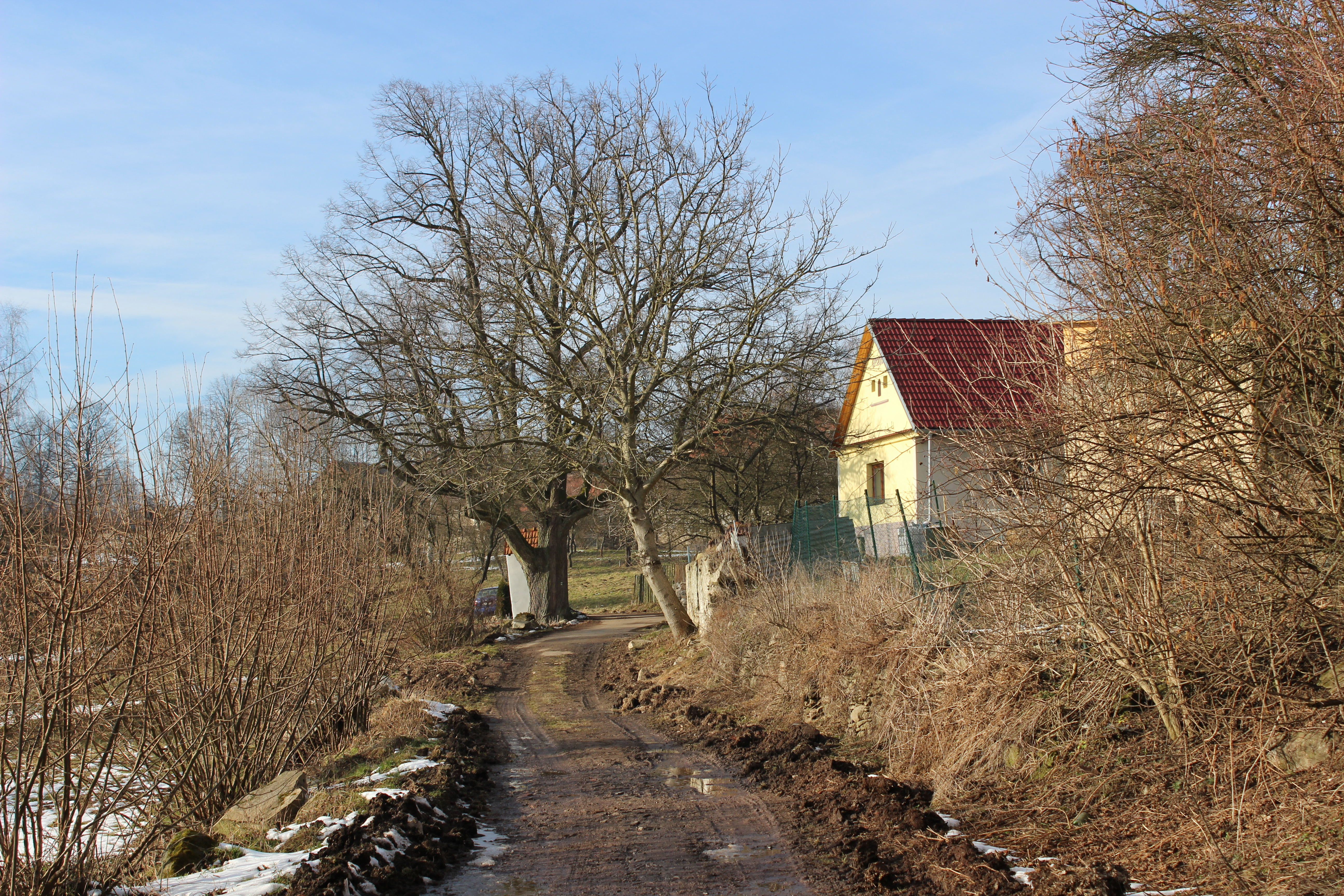 Pohled na ves od lesa Bečov. Mlčkov - část obce Přeštěnice v okrese Písek. Česká republika.